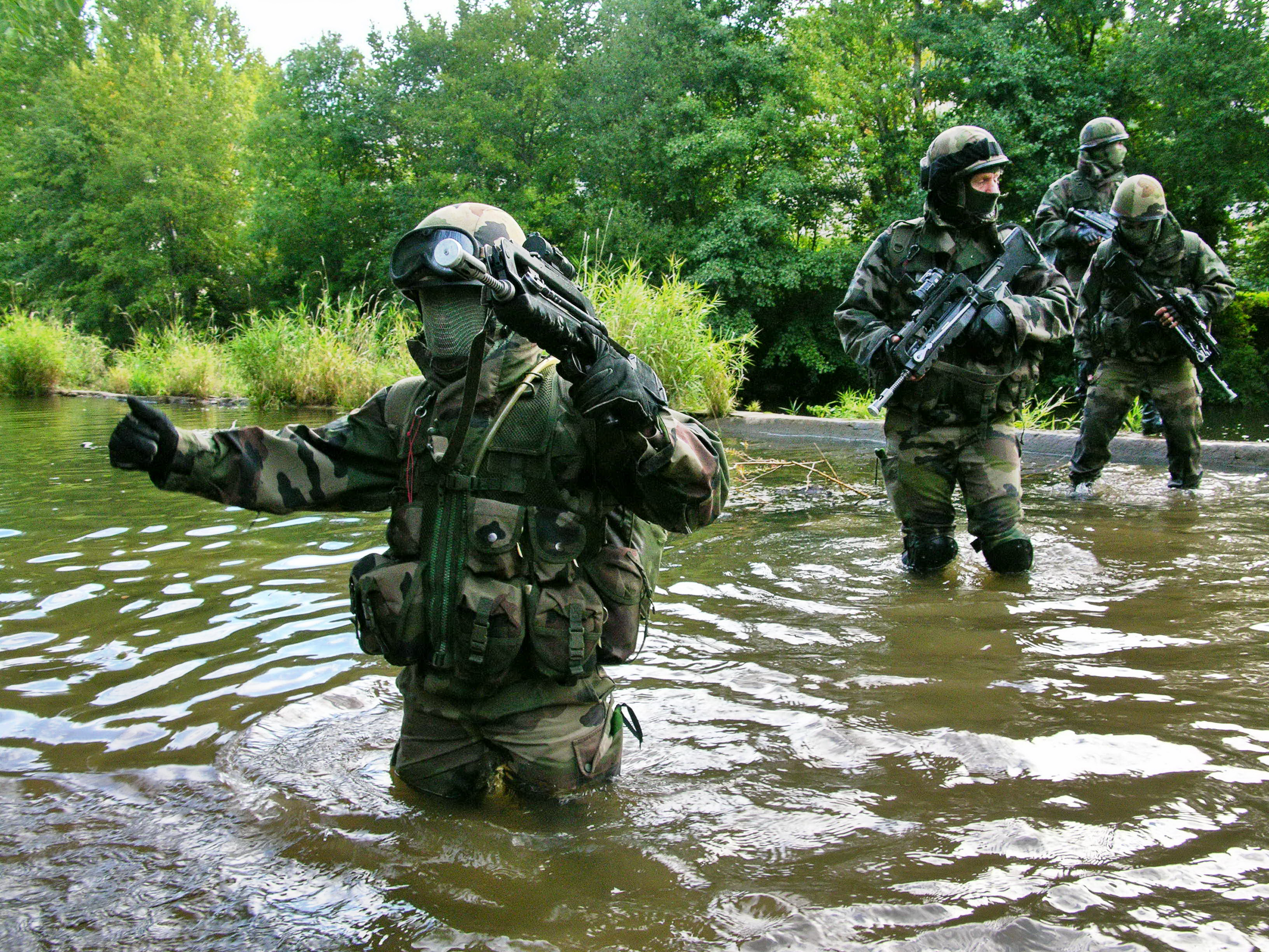 Légionnaires du 2e régiment étranger d'infanterie en progression dans un cours d'eau en France en 2006